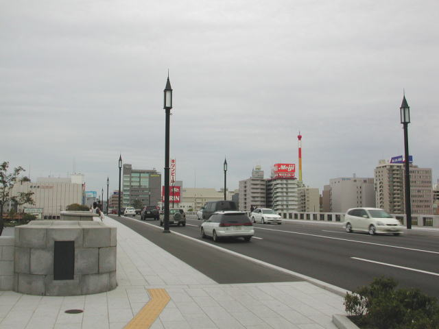 萬代橋（左岸下流側より橋上を望む）